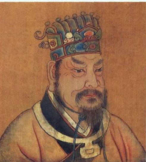 周康王画像，清人绘